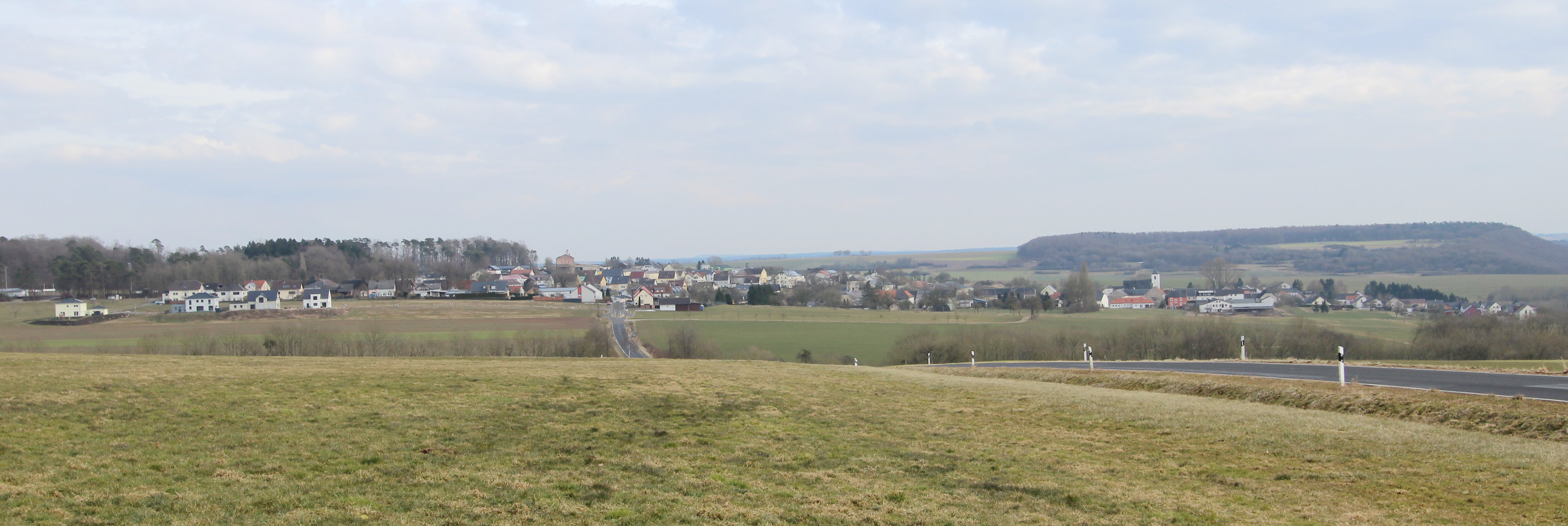 54634 Metterich. Panoramablick von der Maria-Hilf Kapelle in Erdorf. Aufnahme von 2018.